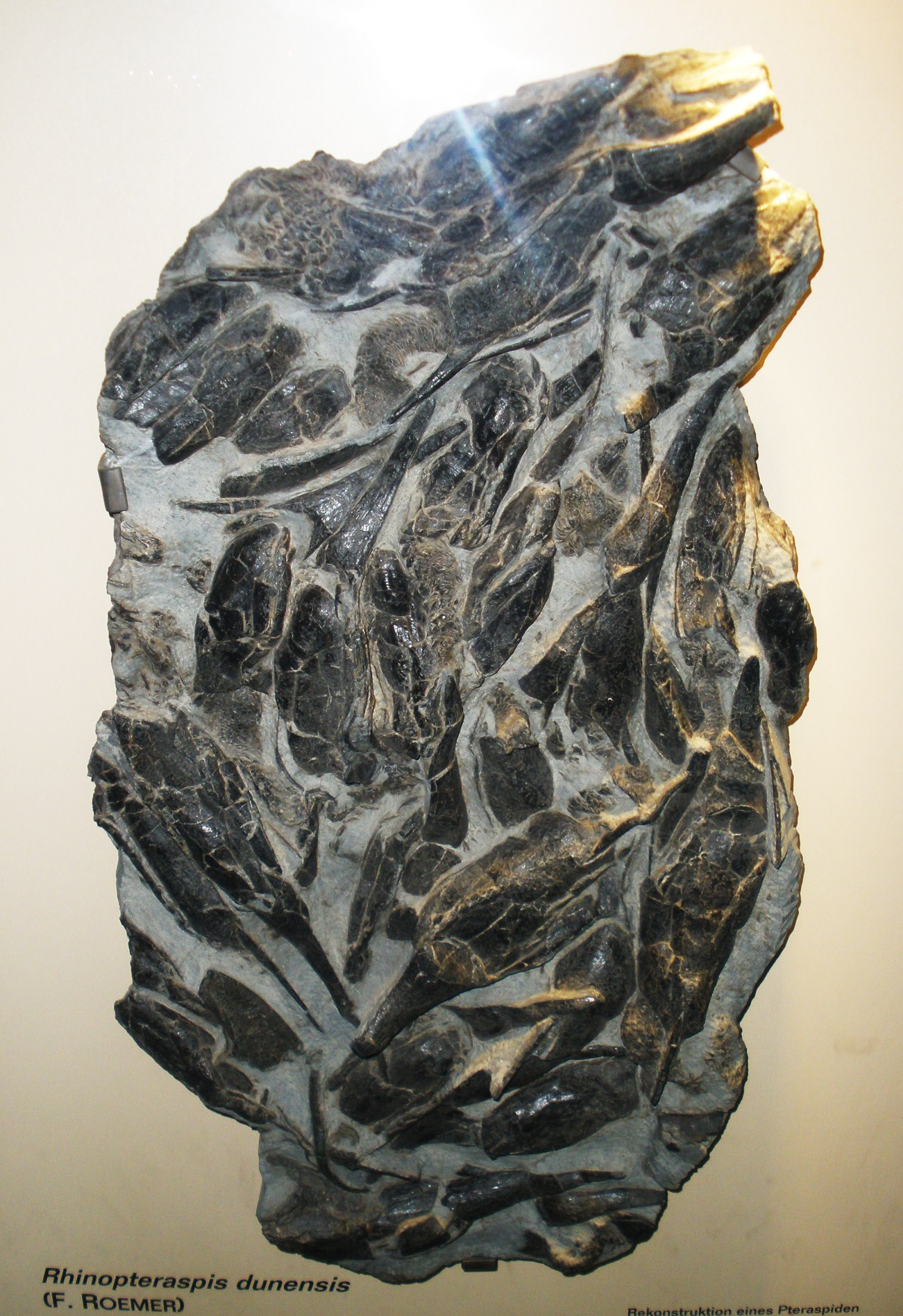 Fossil of Rhinopteraspis, an extinct agnathan- Took the photo at Senckenberg Museum of Frankfurt